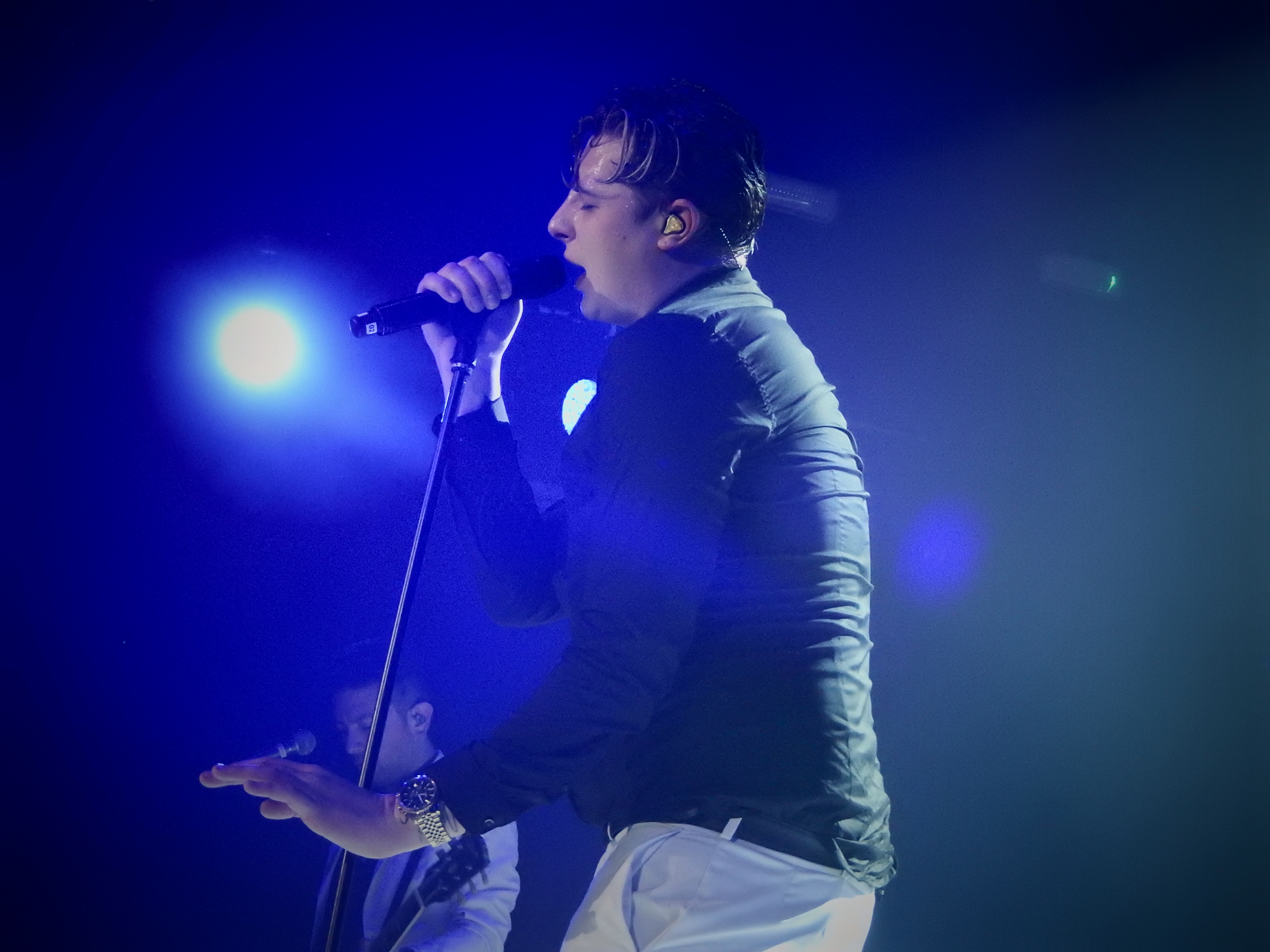 John Newman, Koko, London